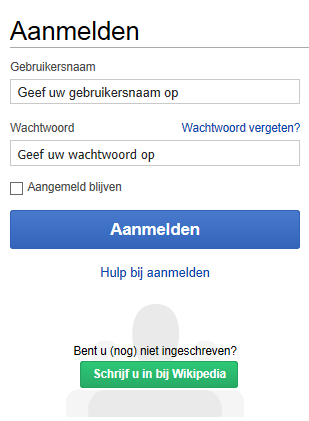 Figuurtje aanmeldproces Wikipedia